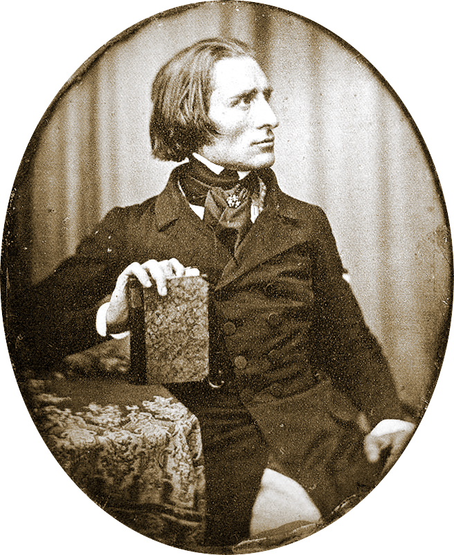 Franz List